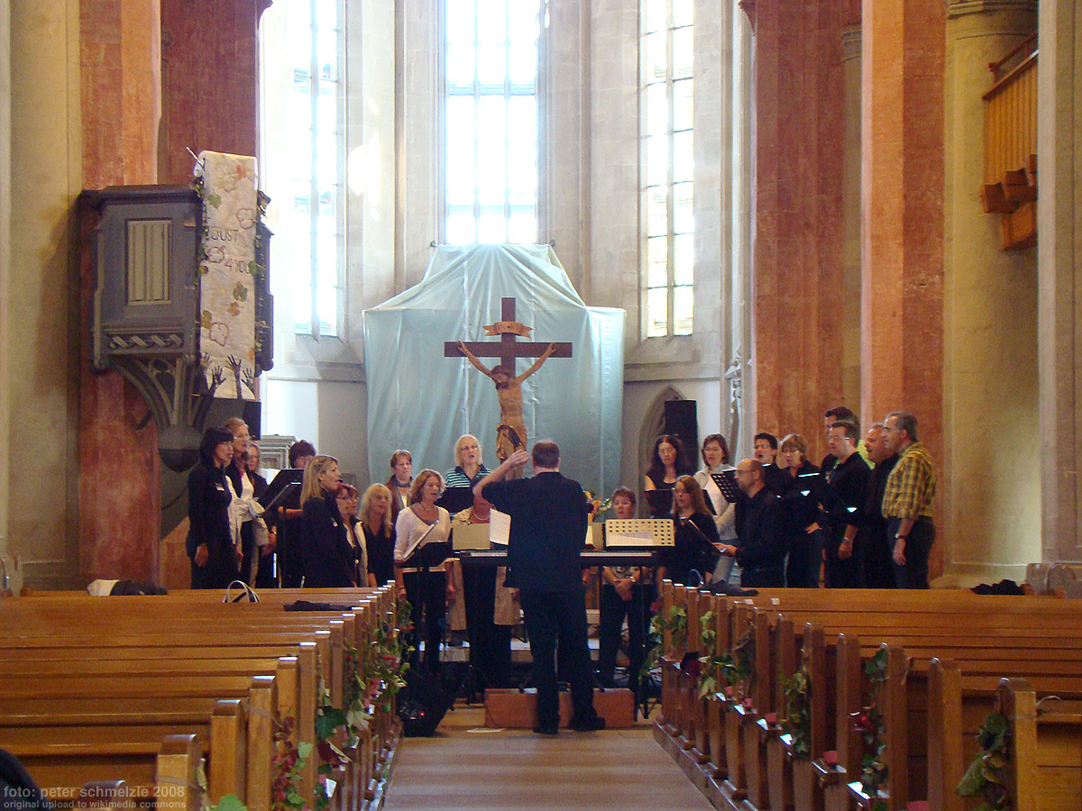 Chorprobe in der Regiswindiskirche in Lauffen am Neckar, Kunstwerke im Chor wegen Renovierungsarbeiten verhüllt